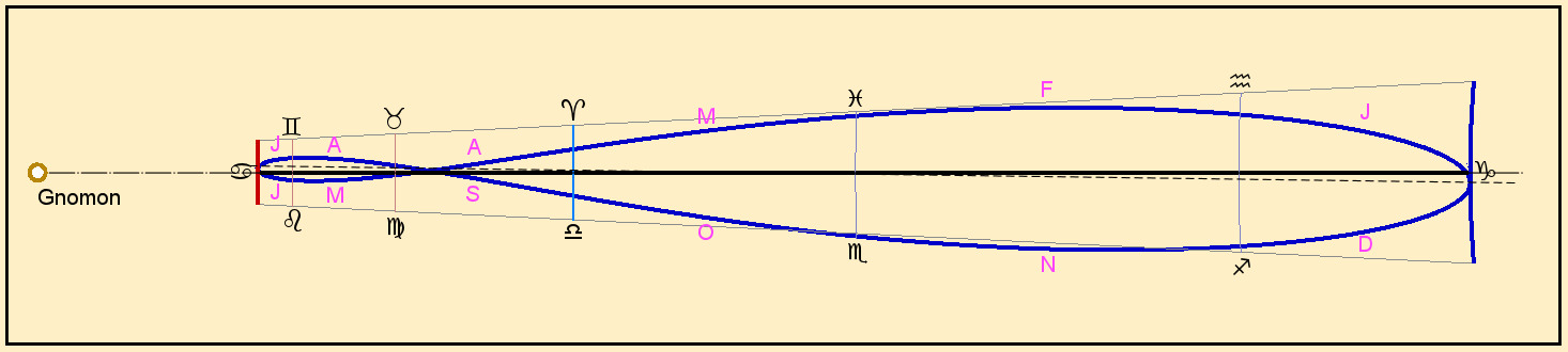 Dessin de la méridienne de Tonnerre.